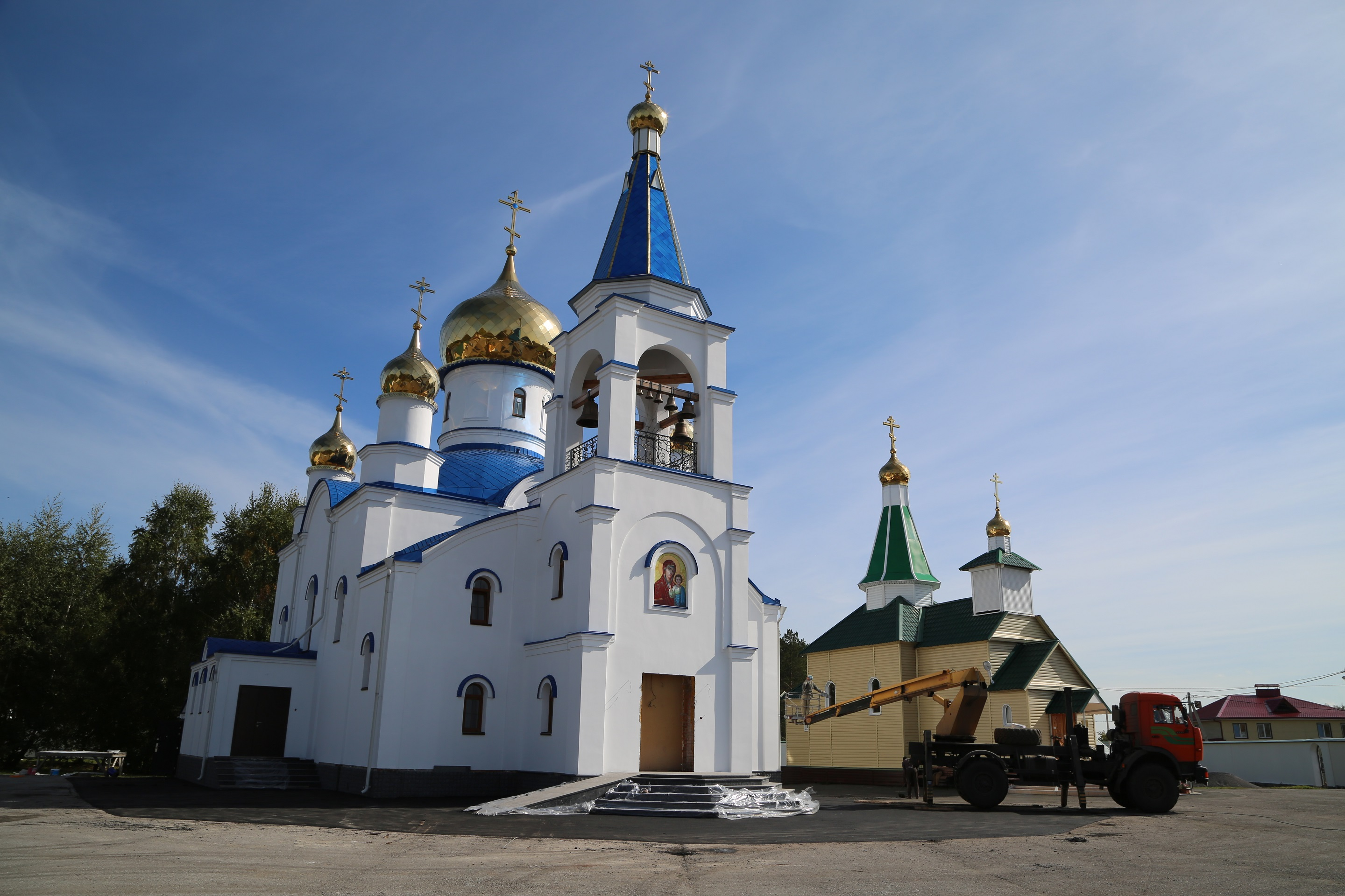 Храмовый комплекс, пос. Школьный, главный вид